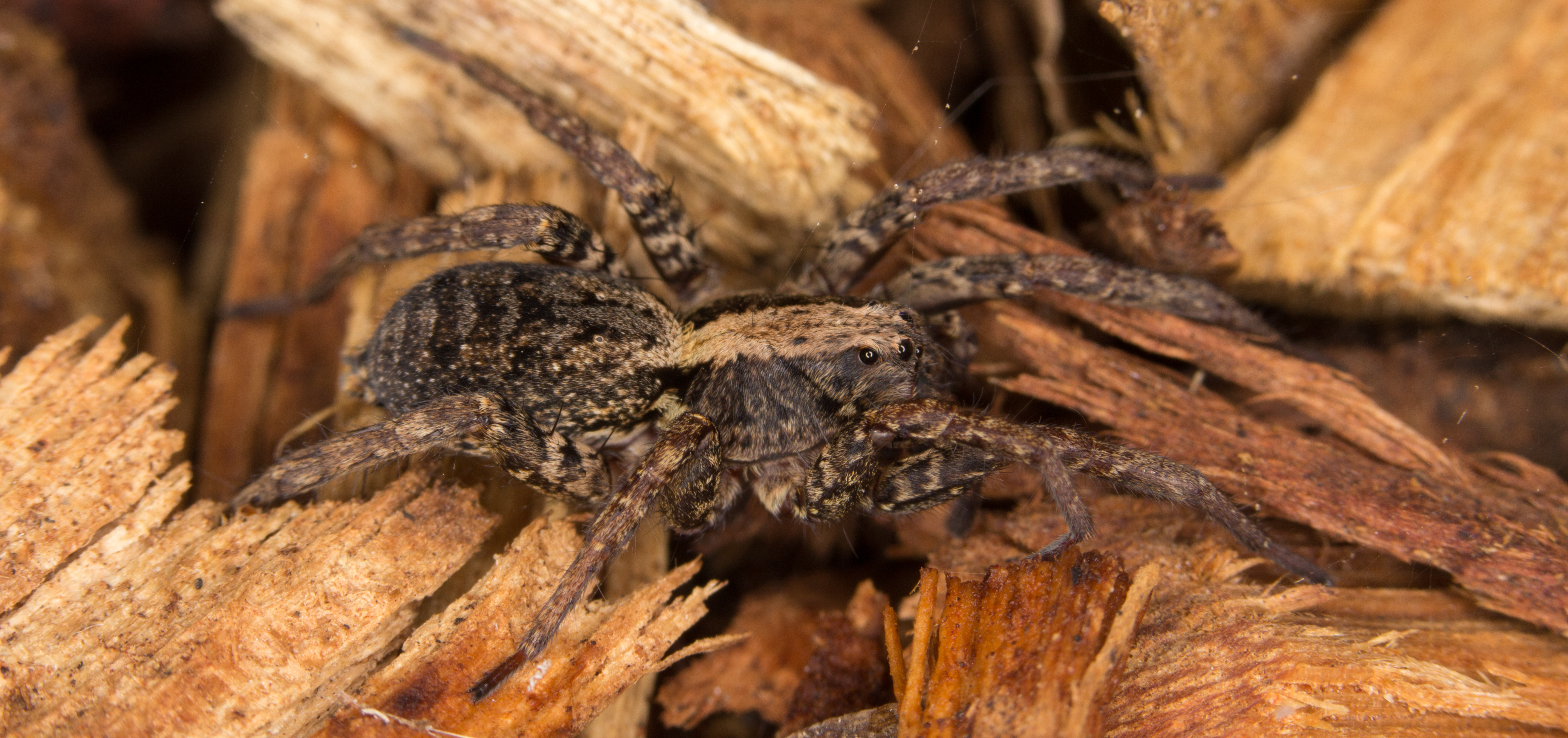 Wolf spider